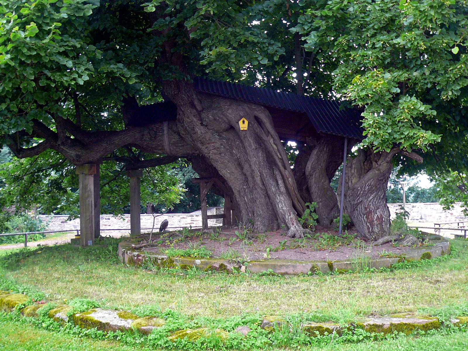 Schlosslinde Augustusburg